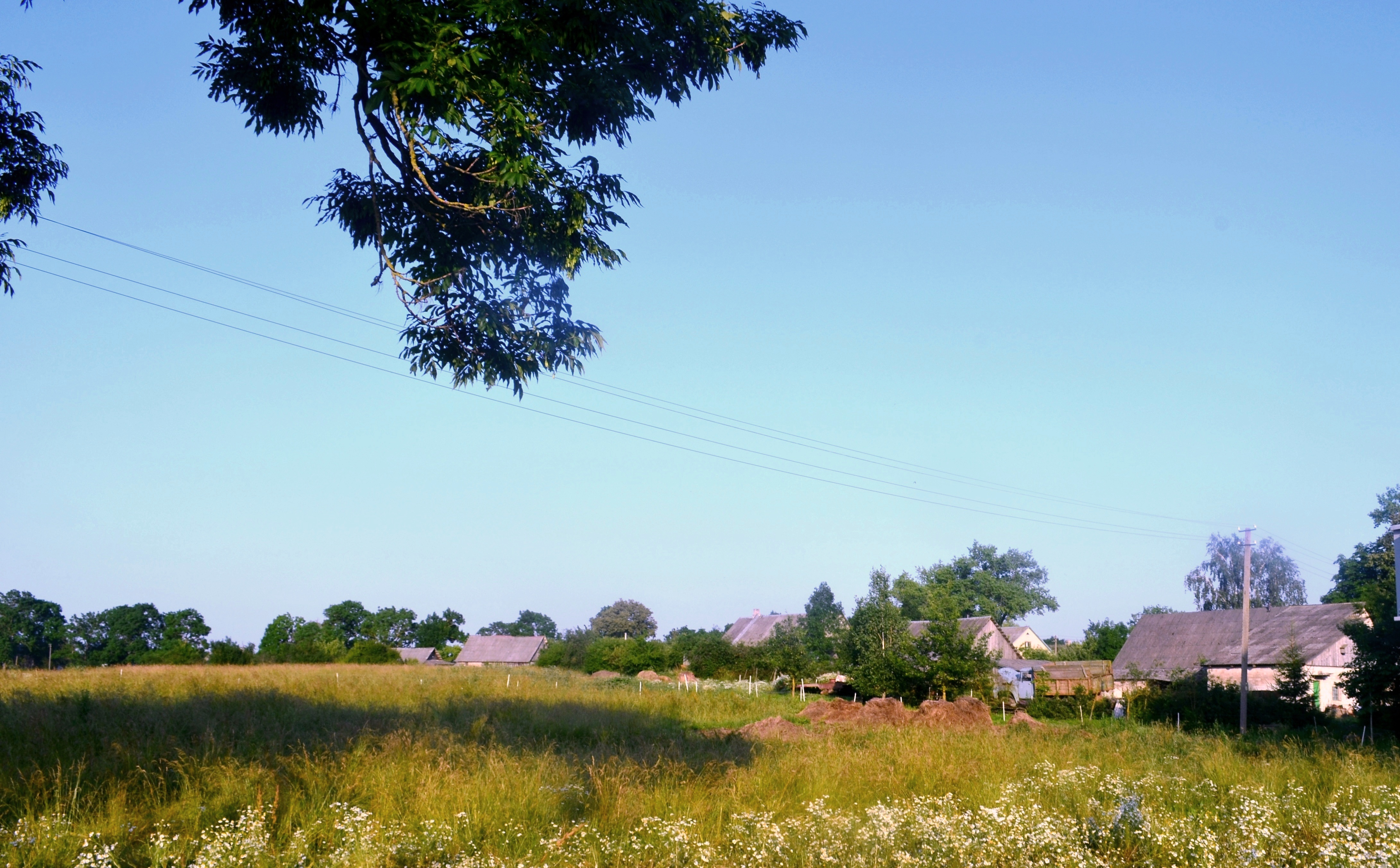 Milagainiai, Jonavos raj.